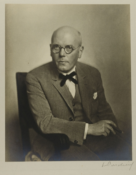 Staatliche Landesbildstelle Hamburg, Sammlung zur Geschichte der Photographie, erworben 1968